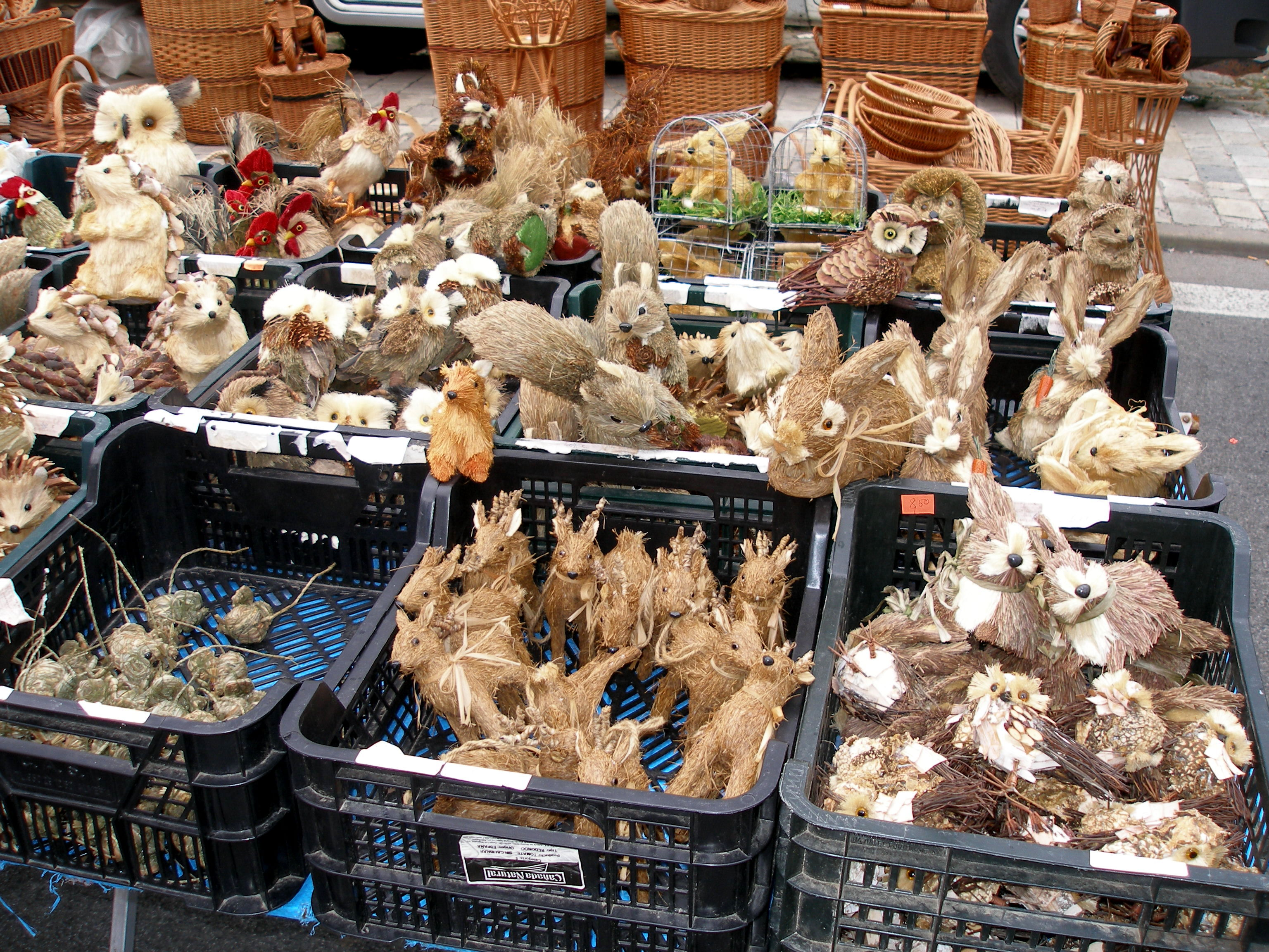 Mesto Sabinov. Predajné stánky počas Sabinovského jarmoku 11.6.2011.